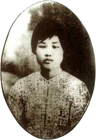 Immagine presa da en.wiki (it::en:Image:Yang Kaihui.jpg)